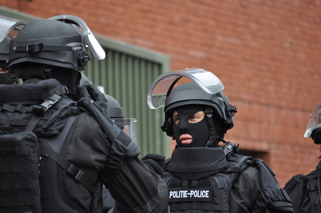 BAA/AOB